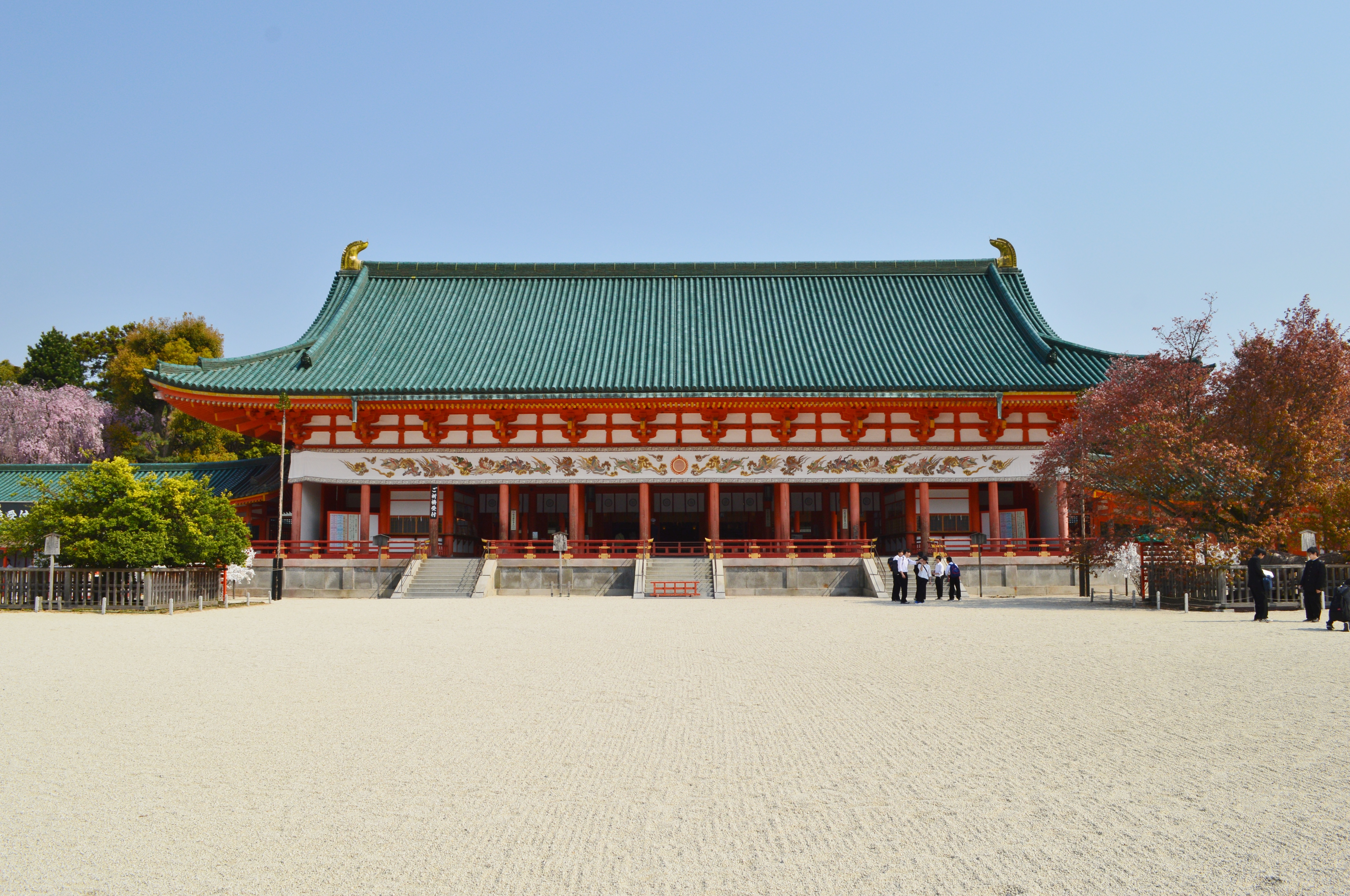 平安神宮 外拝殿